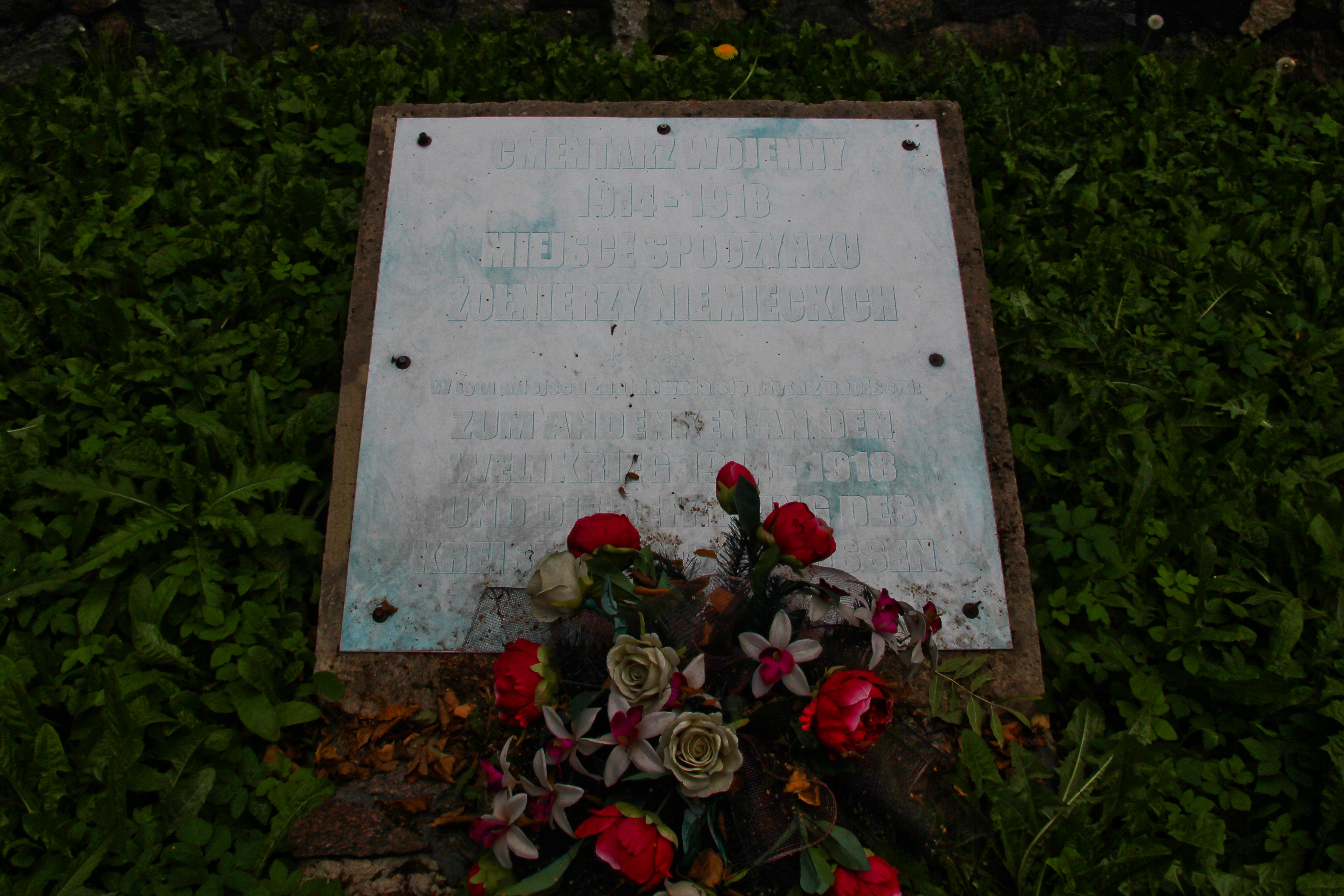 Górki wieś w Polsce w województwie warmińsko-mazurskim, w powiecie kętrzyńskim, w gminie Barciany.